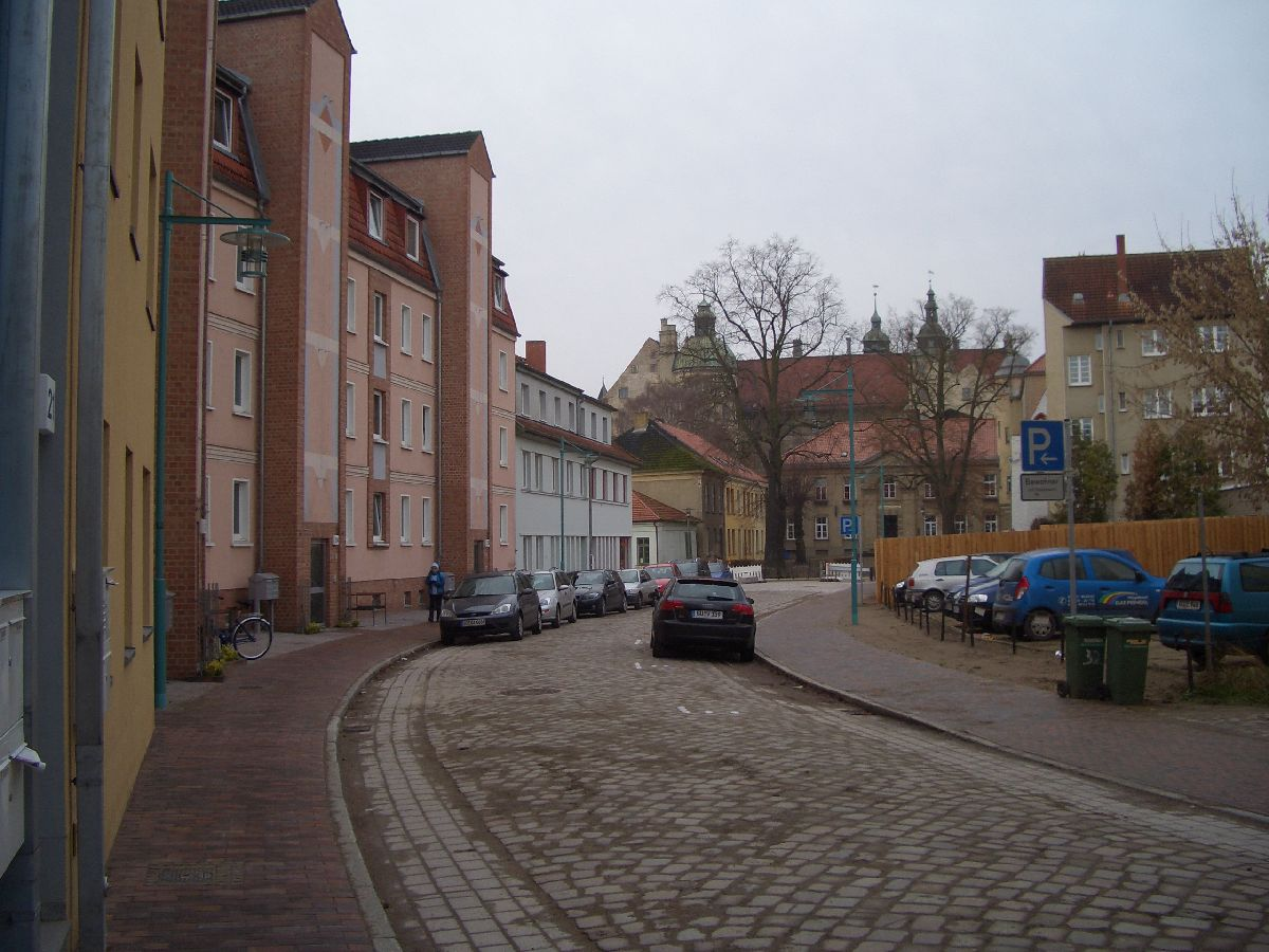 Lange Straße, Güstrow (Mecklenburg-Vorpommern).